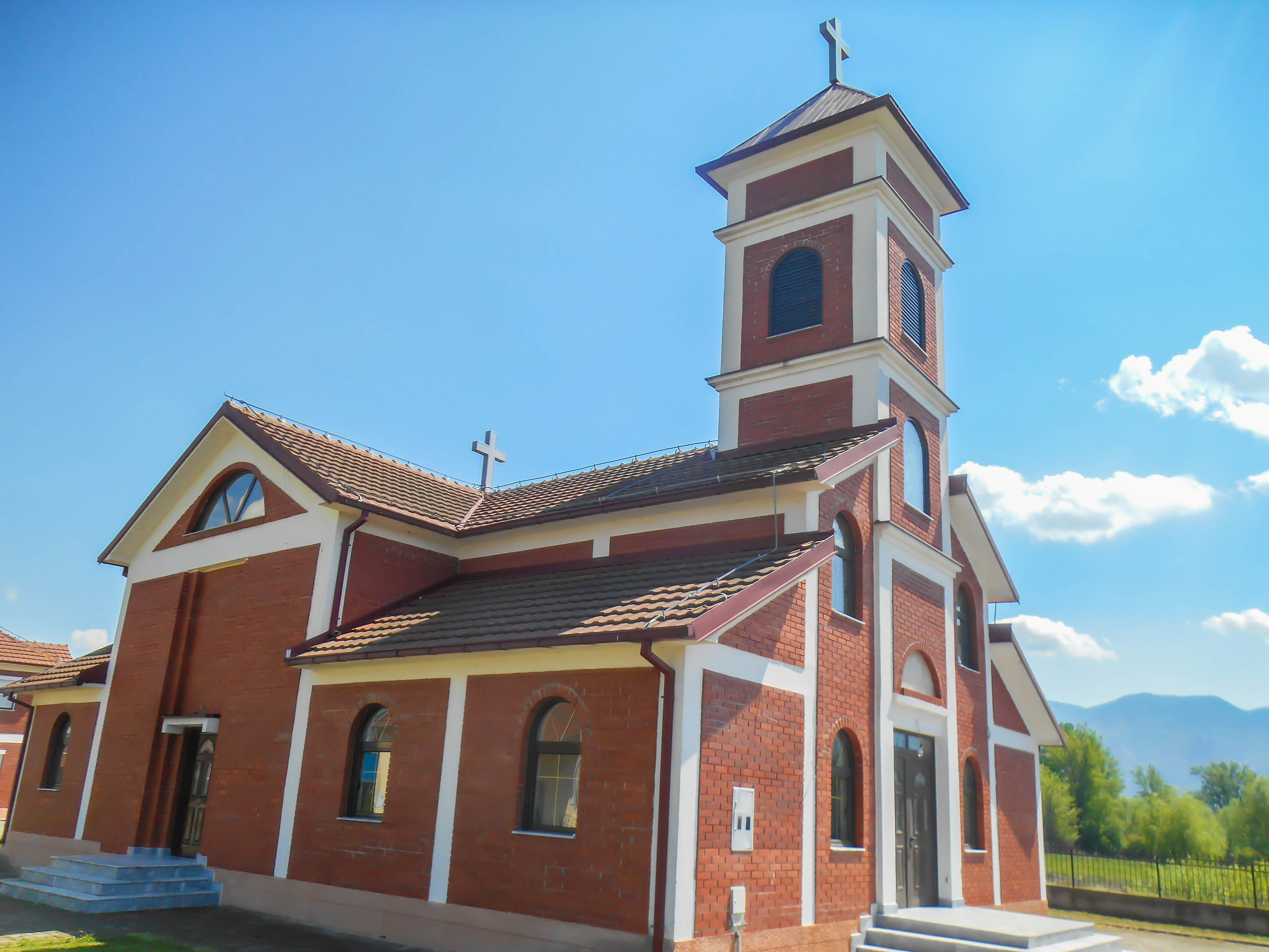 Црква „Св. Никола“ - Секирник